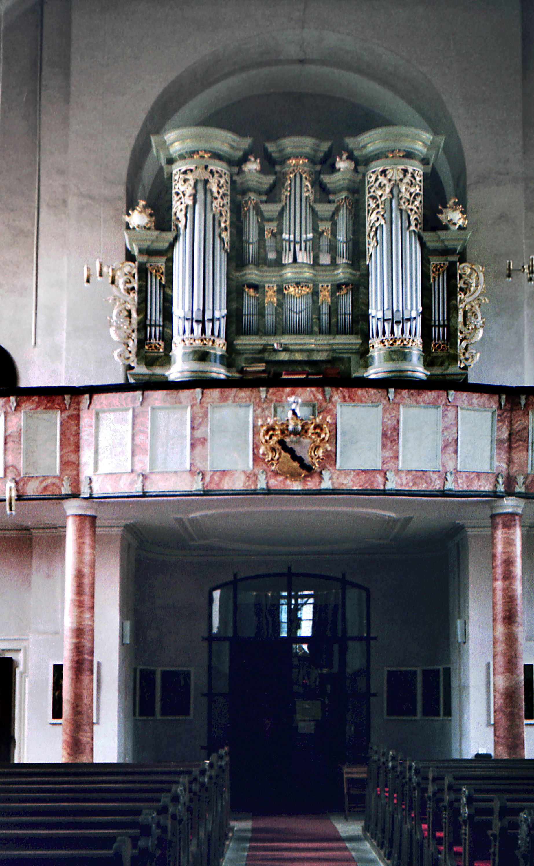 06.07.1985 DDR 6201 [36452] Zella/Rhön: Probsteikirche Mariä Himmelfahrt (GMP: 50.673308,10.109352). Einschiffiger Barockbau (1715-1732). Geht auf die Bautätigkeit der fuldaischen Äbte zurück. [F19850706A34.jpg]19850706470NR.JPG(c)Blobelt